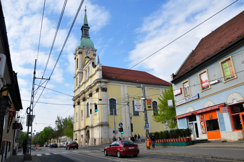 Catholic Church in Újlak, Budapest District II. This is a photo of a monument in Hungary, Identifier: 245